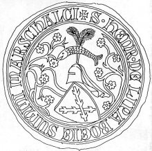 Pečeť Jindřicha z Lipé